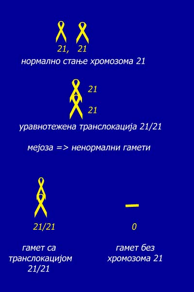 аутор:Снежана Трифуновић